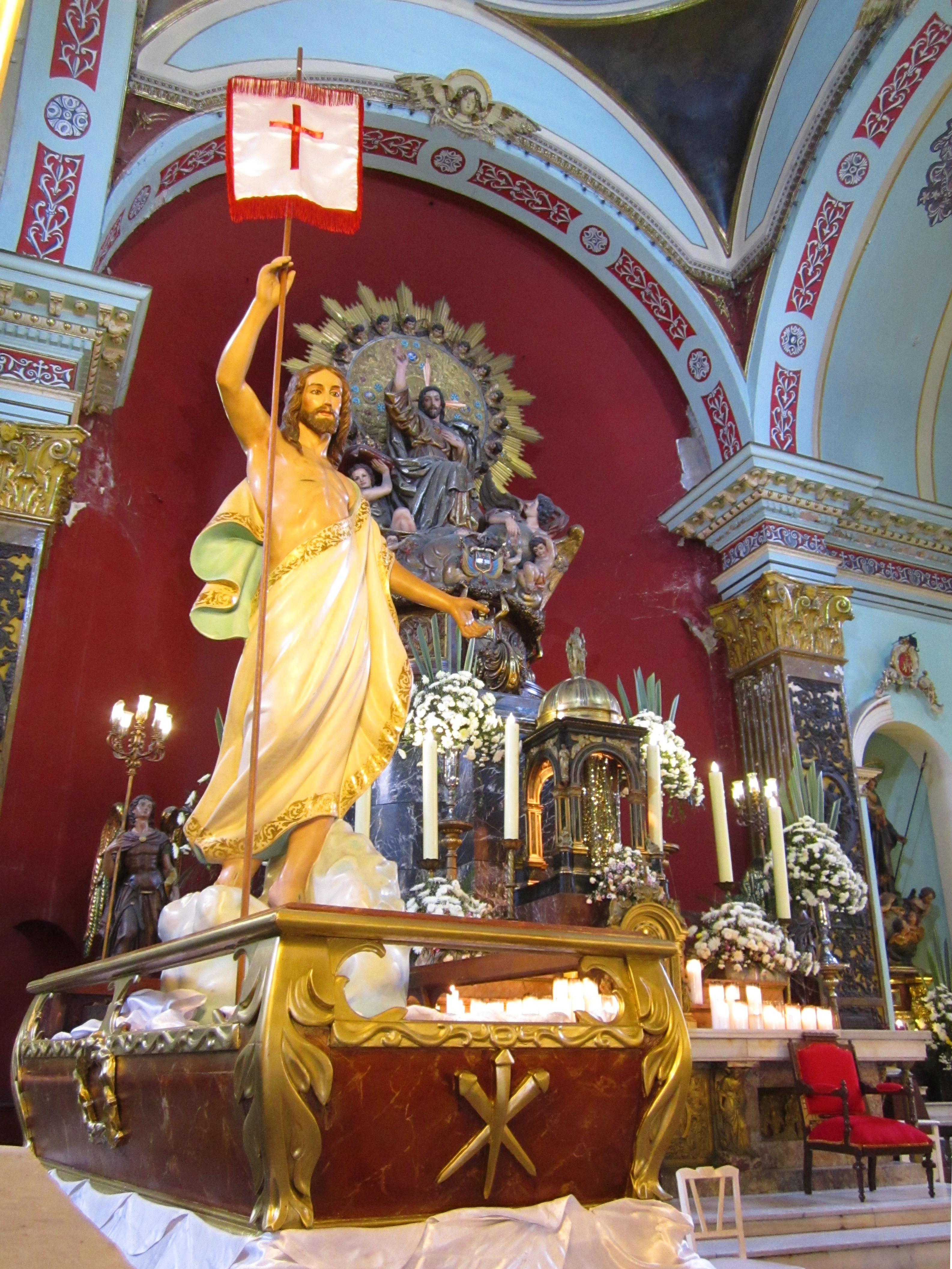 Figuras en el altar de la basílica Voto Nacional. Los Mártires, Bogotá.